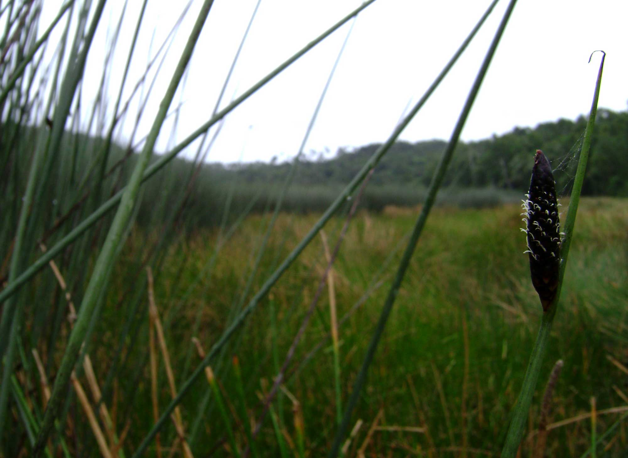 Lepironia mucronata; (kuta ngofe), in Ngofe swamp, Vavaʻu, Tonga